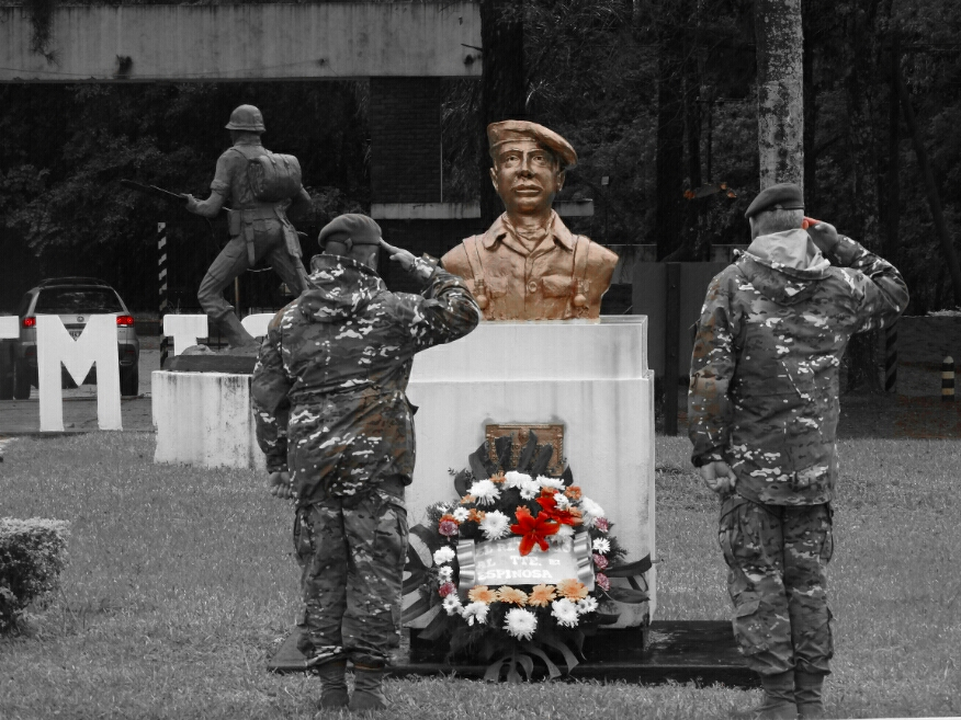 Entrega floral al busto del Tte Espinosa.